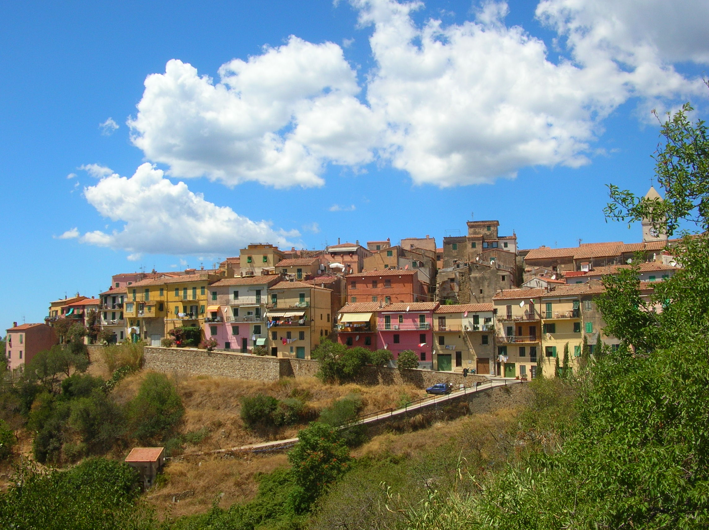 Capoliveri (île d'Elbe, Toscane, Italie)